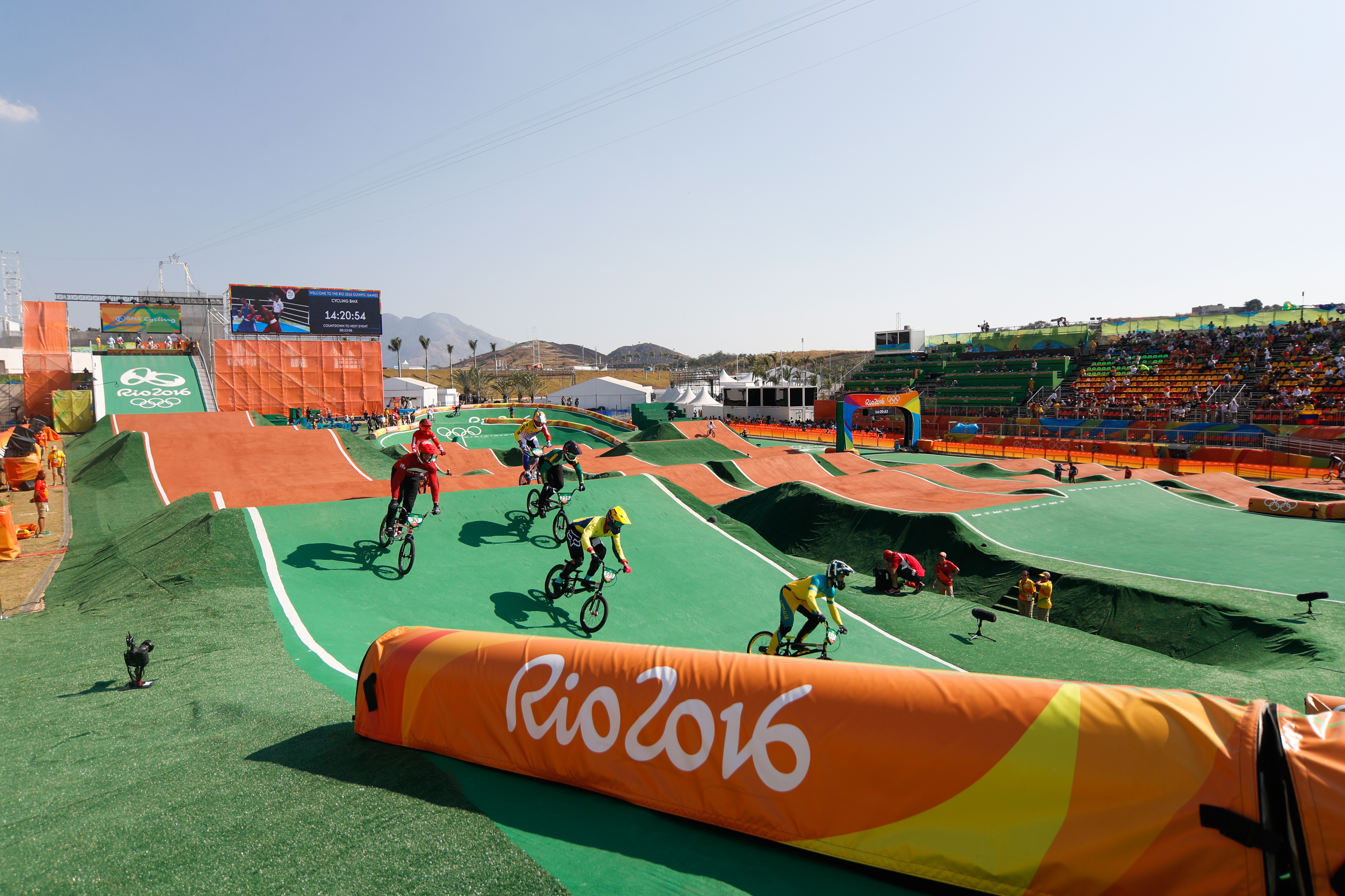 Rio de Janeiro - Ciclistas começam as competições de BMX nos Jogos Olímpicos Rio 2016, no Parque Radical em Deodoro (Fernando Frazão/Agência Brasil)